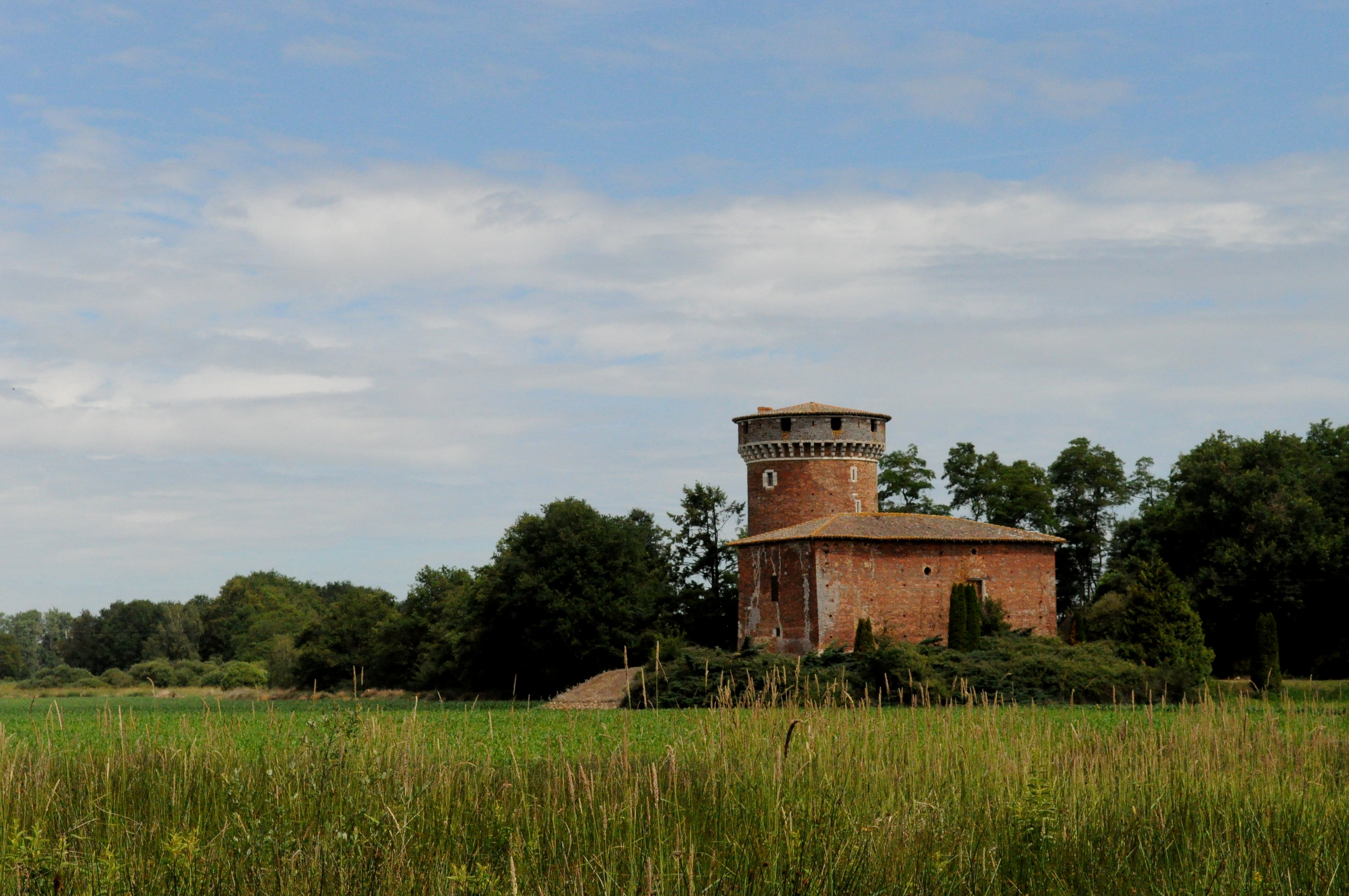 Le lendemain, tour à vélo au départ du Plantay. Nous avons complètement zappée cette tour lors de notre première promenade. Un bâtiment typique de la région, en briques, construit sur un petit monticule : la poype.